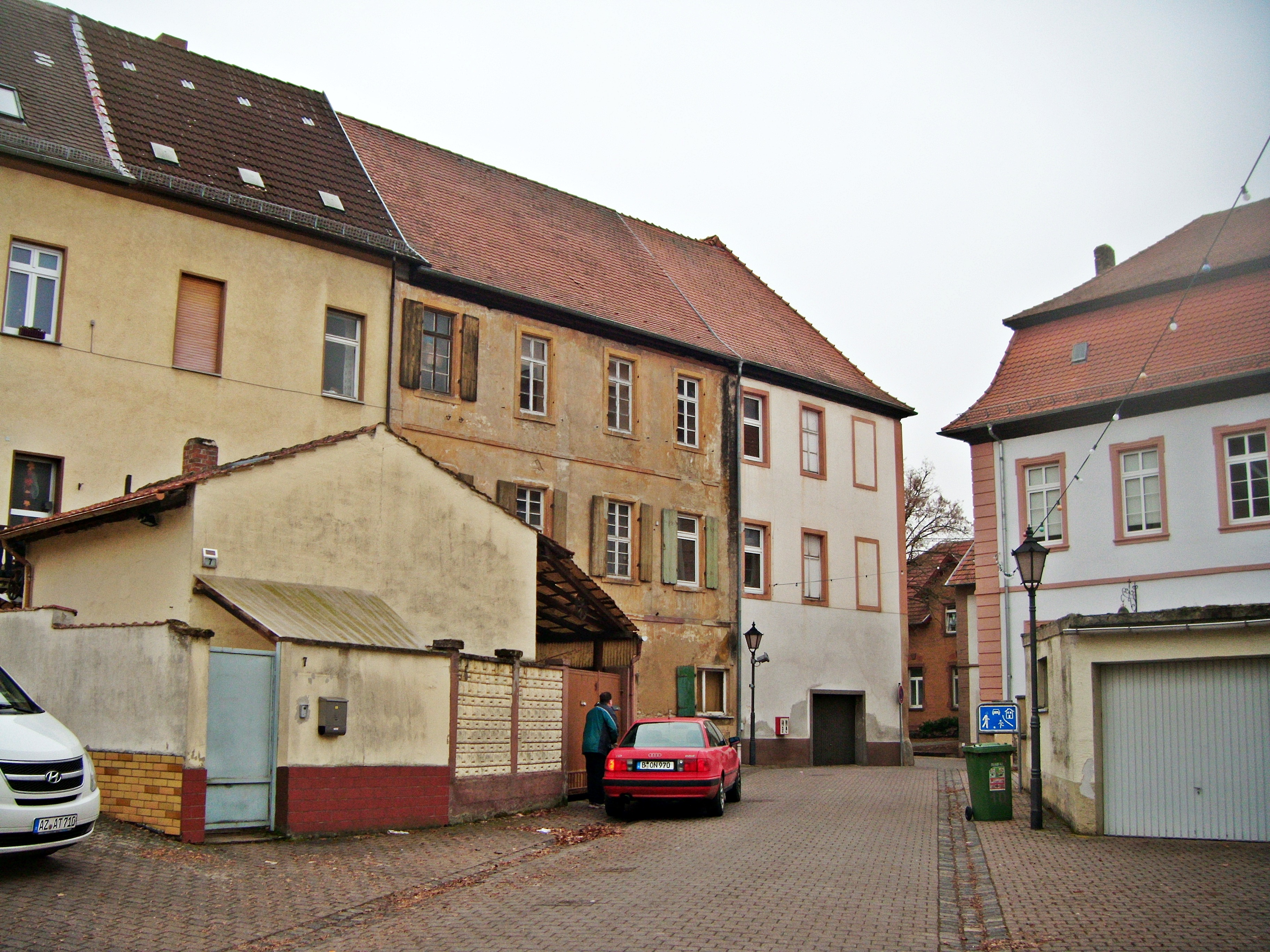 Oberflörsheim Komturei (rechts) und Schaffnerei (links)